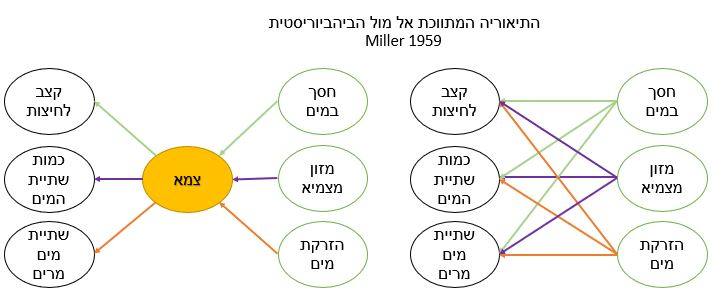 התאוריה המתווכת של מילר אל מול התאוריה הביהוויוריסטית